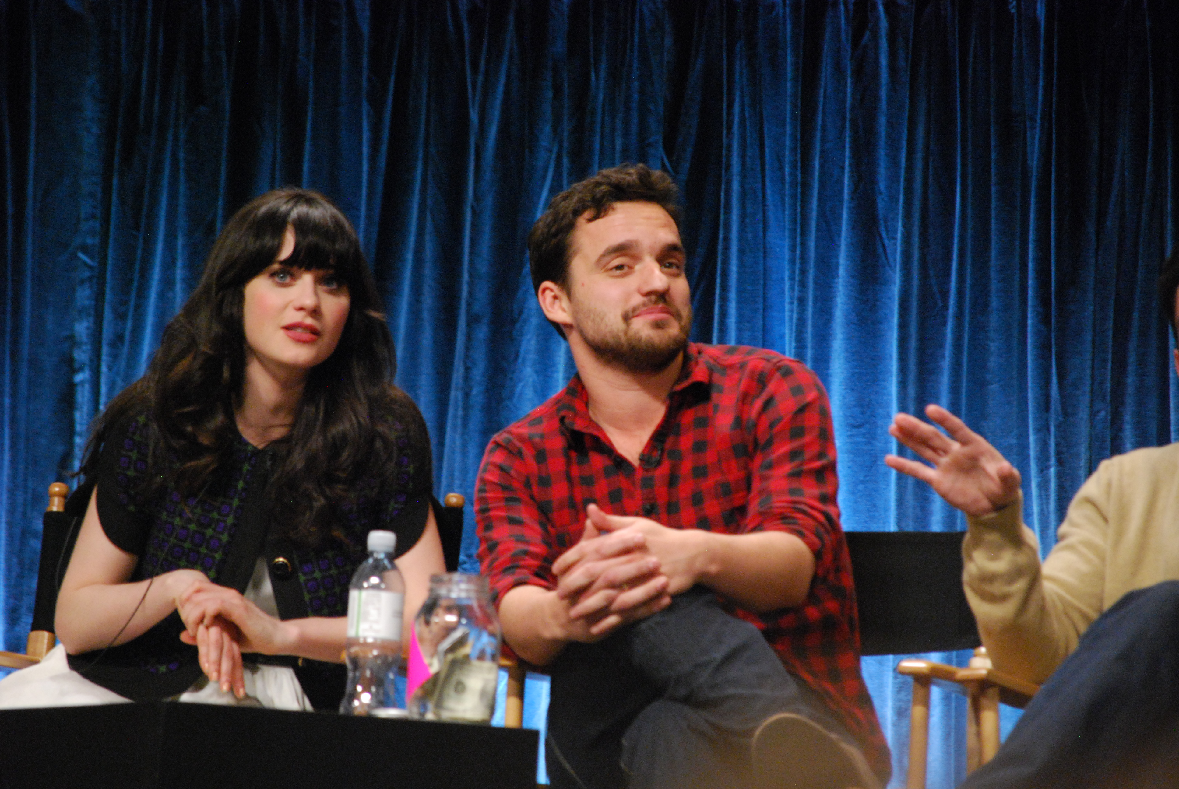 Zooey Deschanel, Jake Johnson